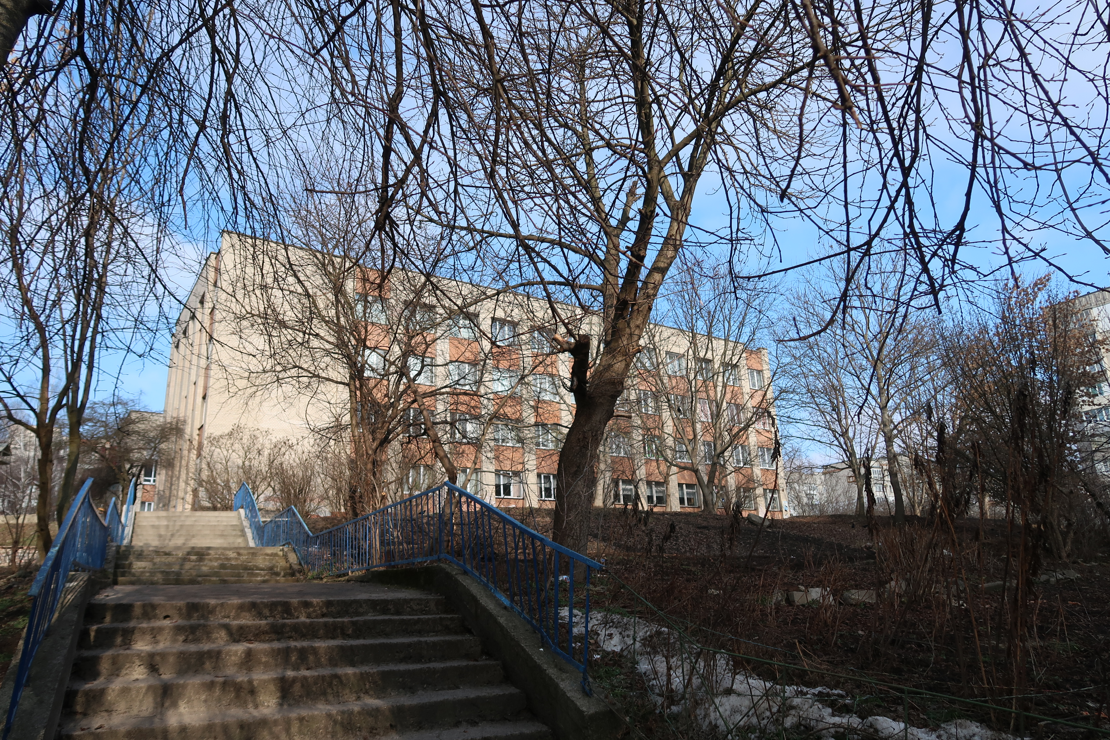 Хмельницкий, улица Победы 14/1. Школа №25